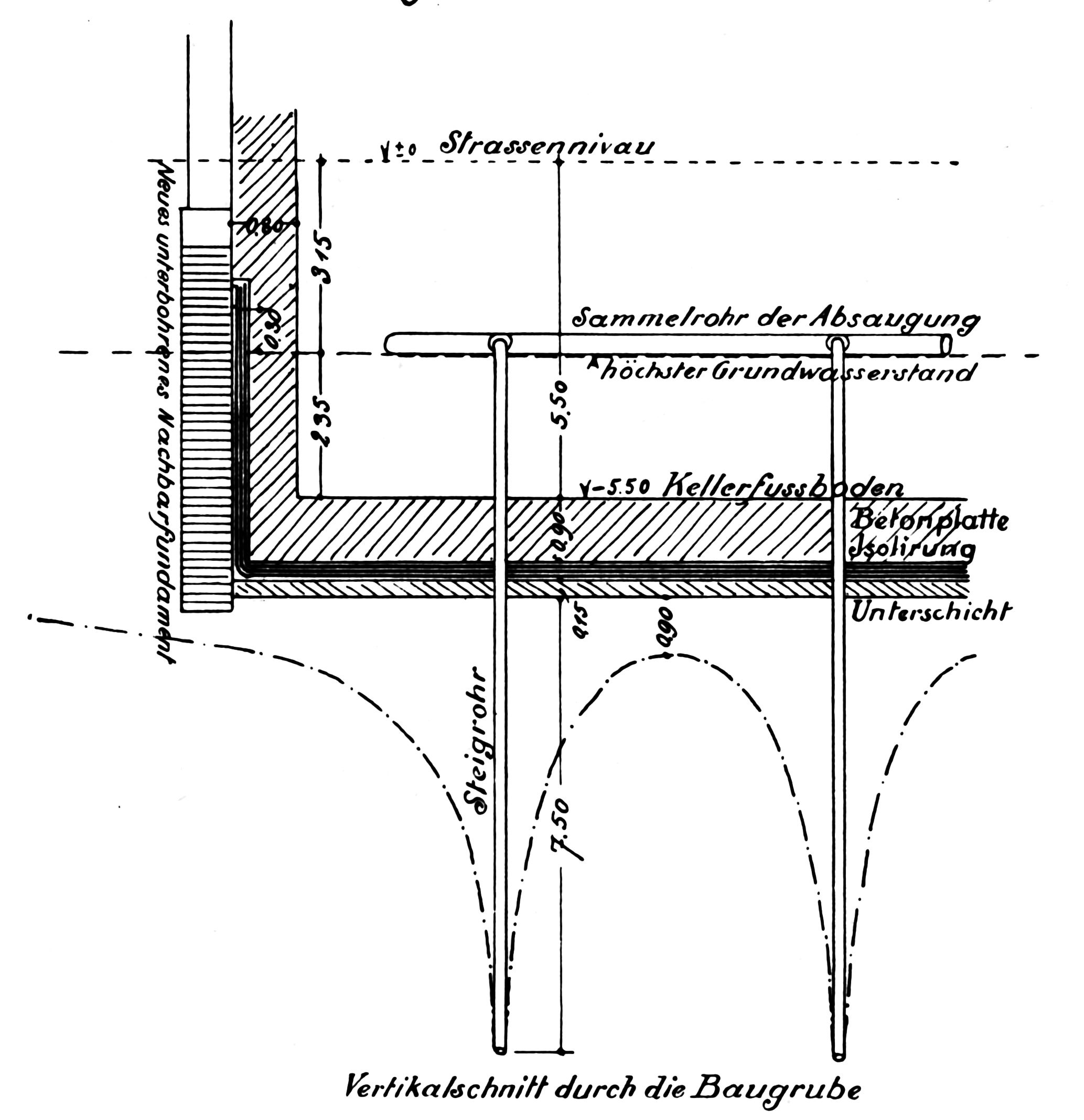 Berlin - Weinhaus Rheingold, Vertikalschnitt der Baugrube